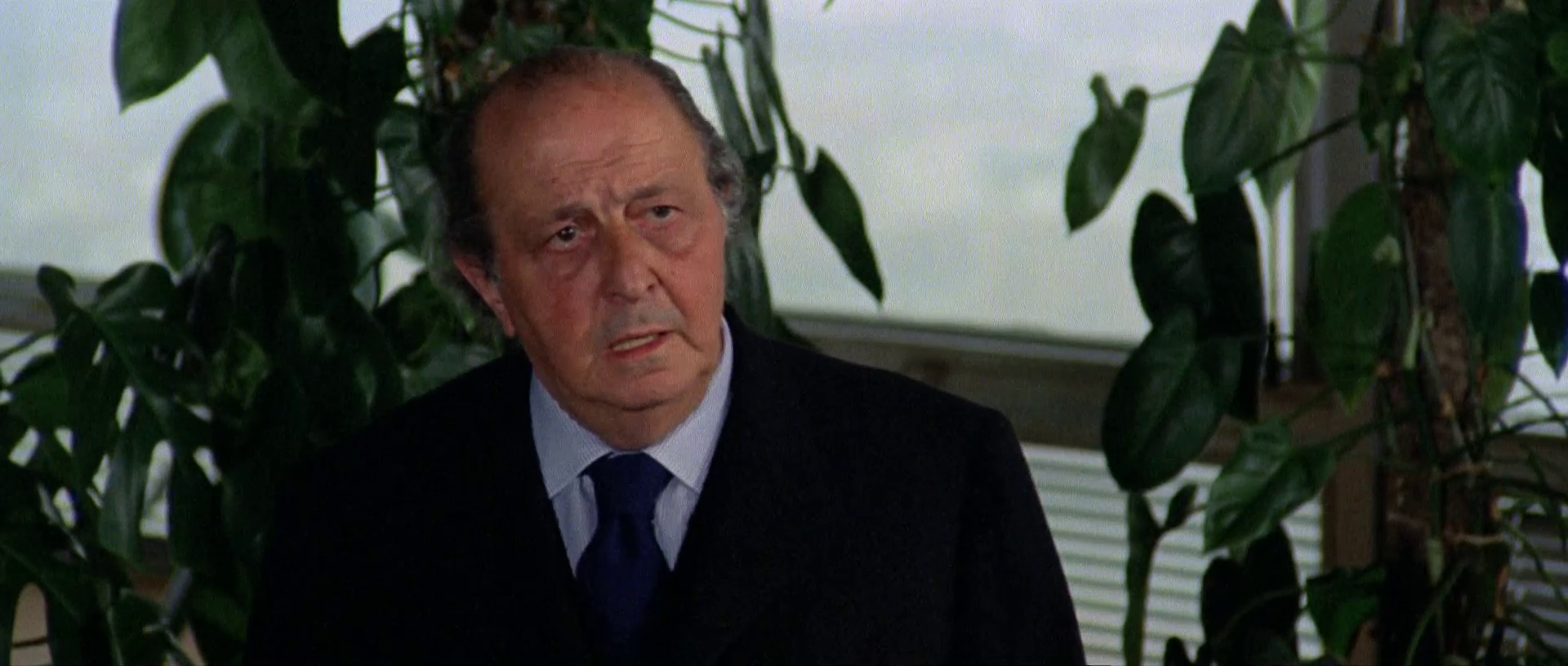 Scena dal film Milano odia: la polizia non può sparare (1974)